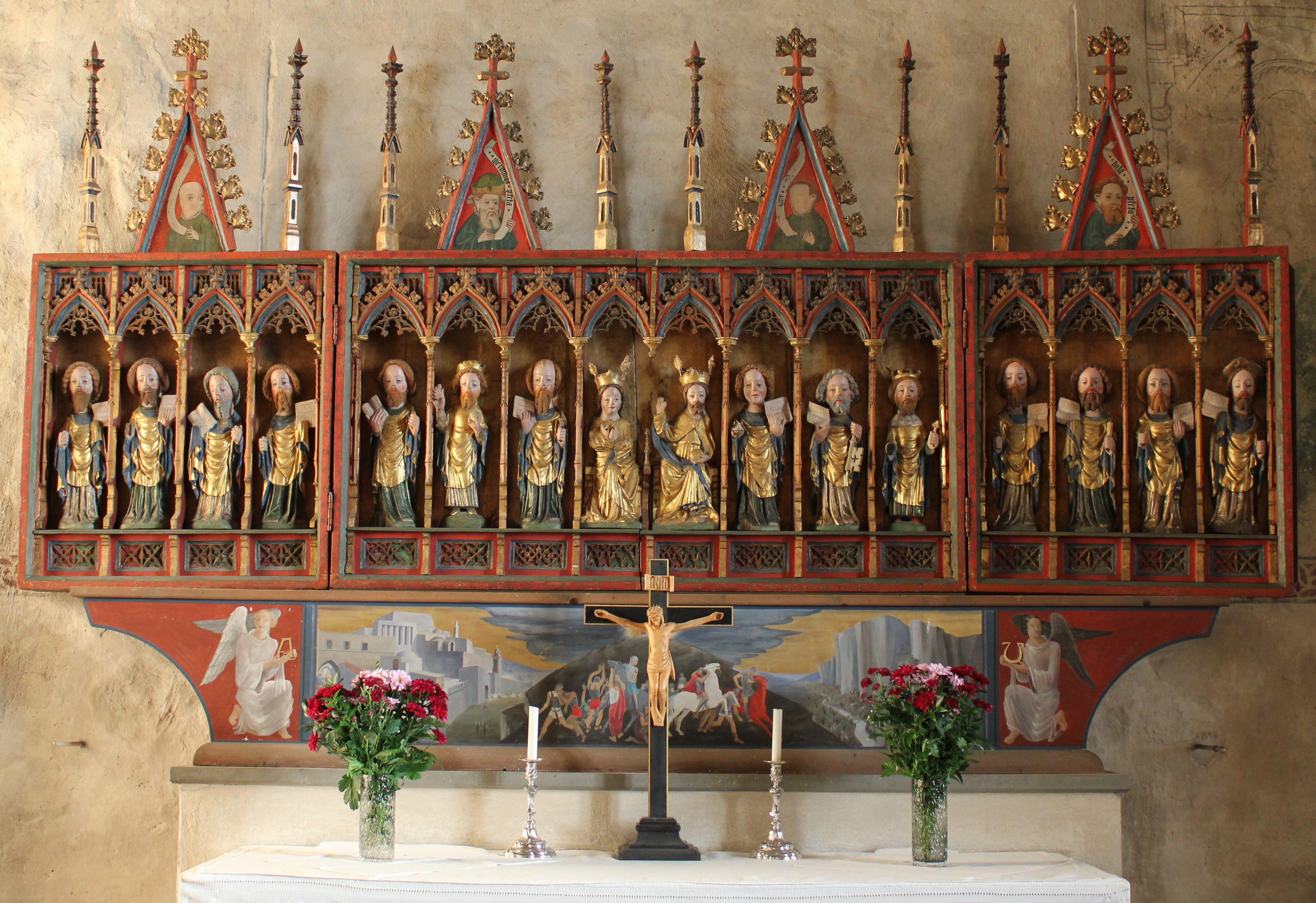 Roslags-Bro kyrka i Norrtälje kommun. Altarskåp.